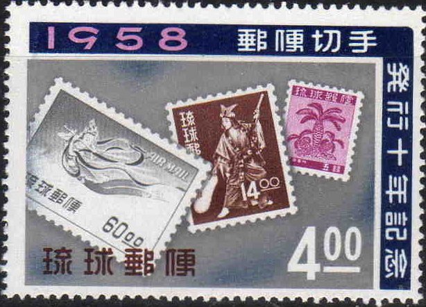 米軍占領下の沖縄で郵便事業を行っていた琉球郵便が1958年に発行した「沖縄切手発行10周年」記念切手。なお、額面は「B円」であるが、直後にB円が廃止になった為、B円表記最後の切手である。